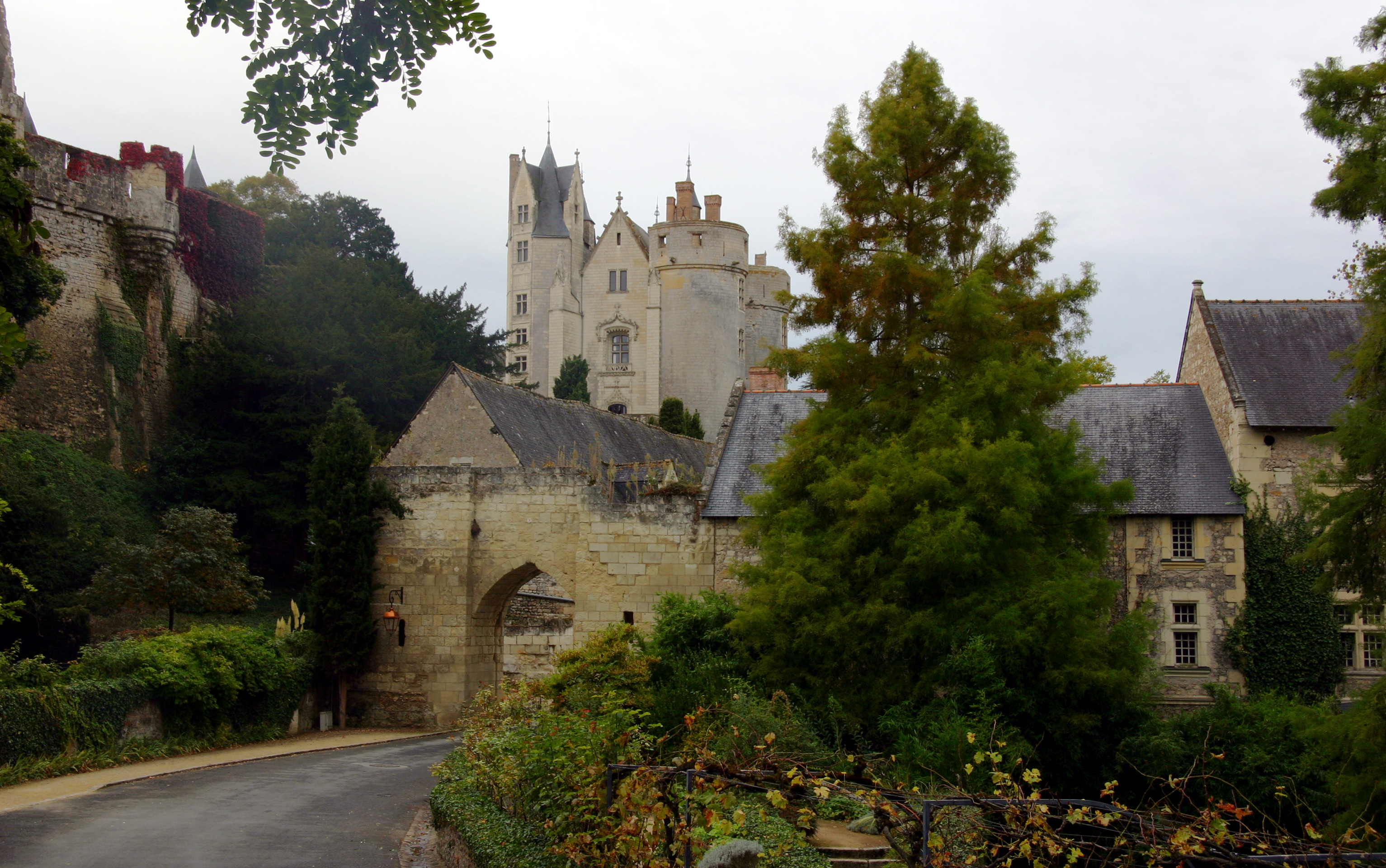 Schloss Montreuil-Bellay